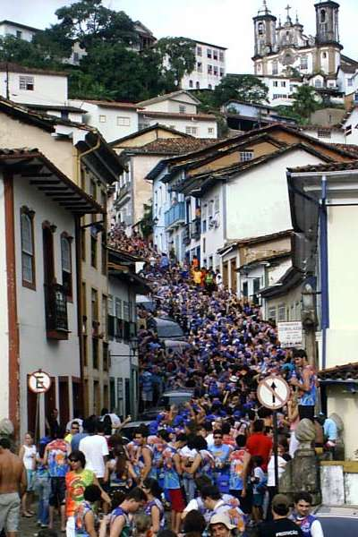 Bloco Diretoria no Carnaval de 2005, Olinda, Pernambuco, Brasil.